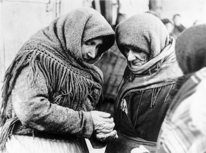 30.12.39, Juden aus dem Ghetto von Lublin